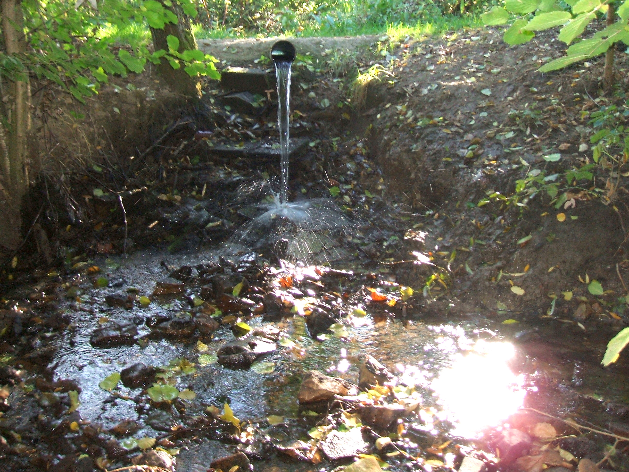 Aus dem Plastikrohr, der als Durchlass unter dem Pfad oder Weg fungiert, fällt das Wasser in den Bach